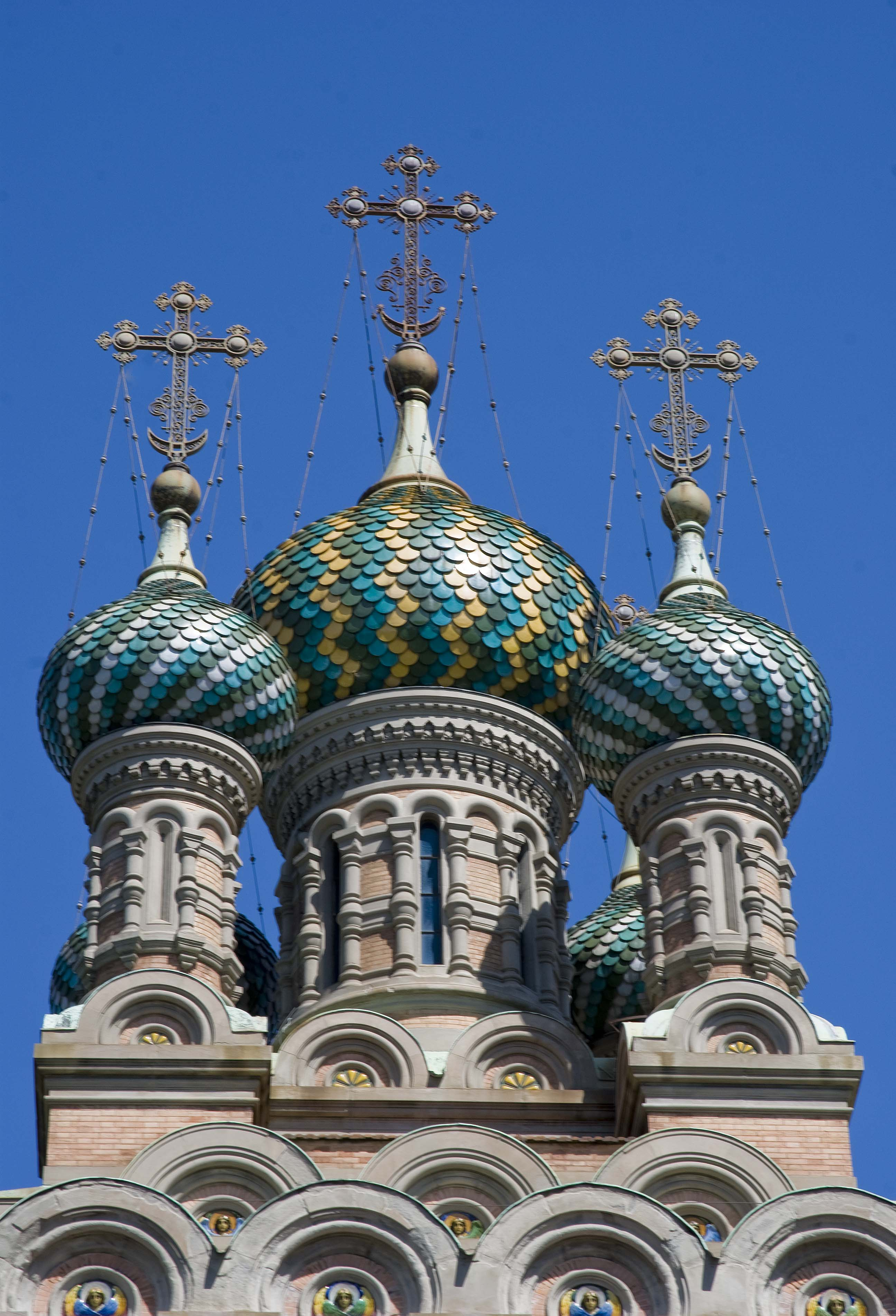 chiesa russa ortodossa della natività - Firenze